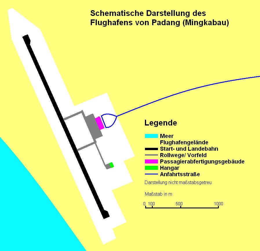 map of padang airport